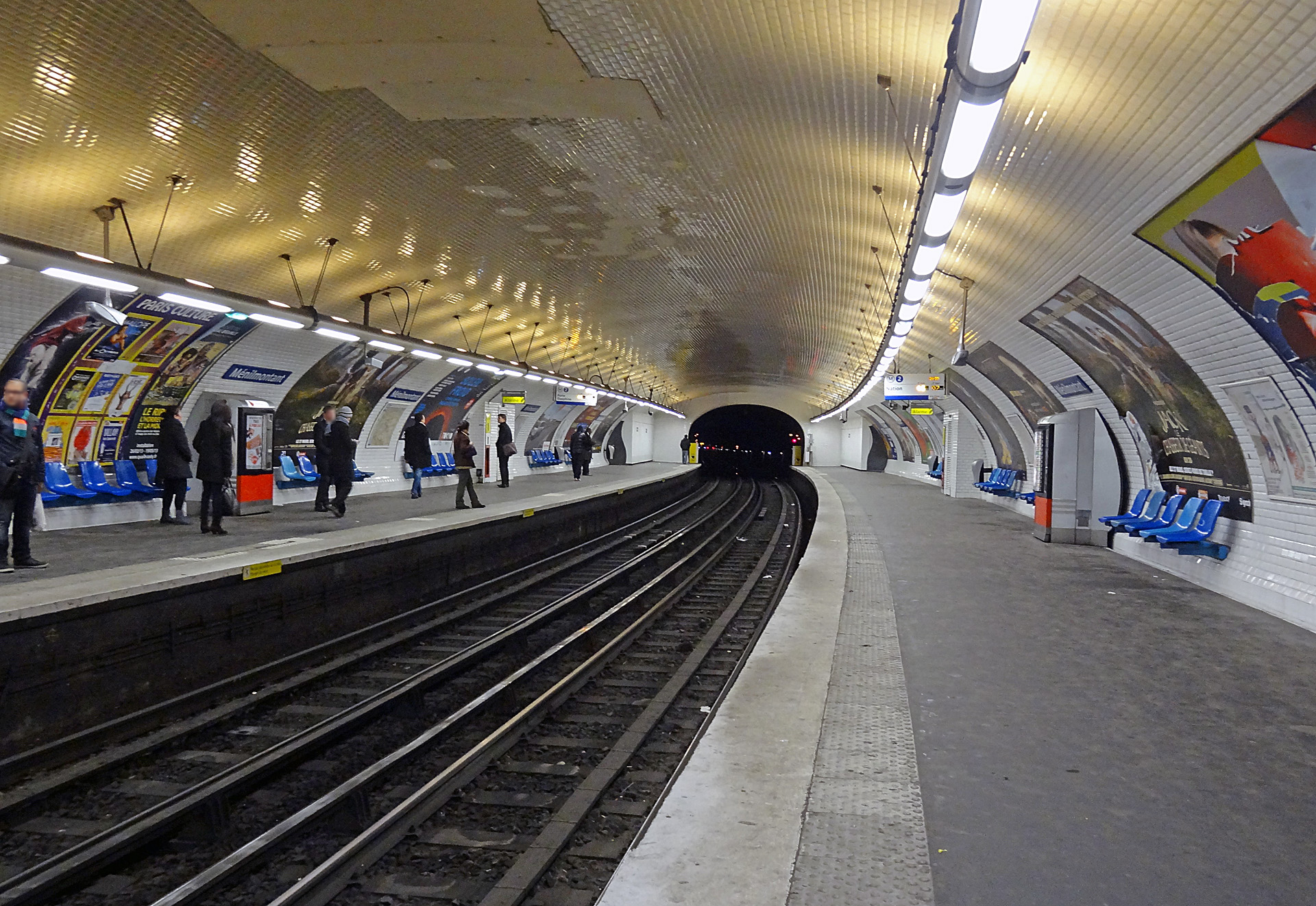 Station Ménilmontant de la ligne 2 du métro de Paris, France.